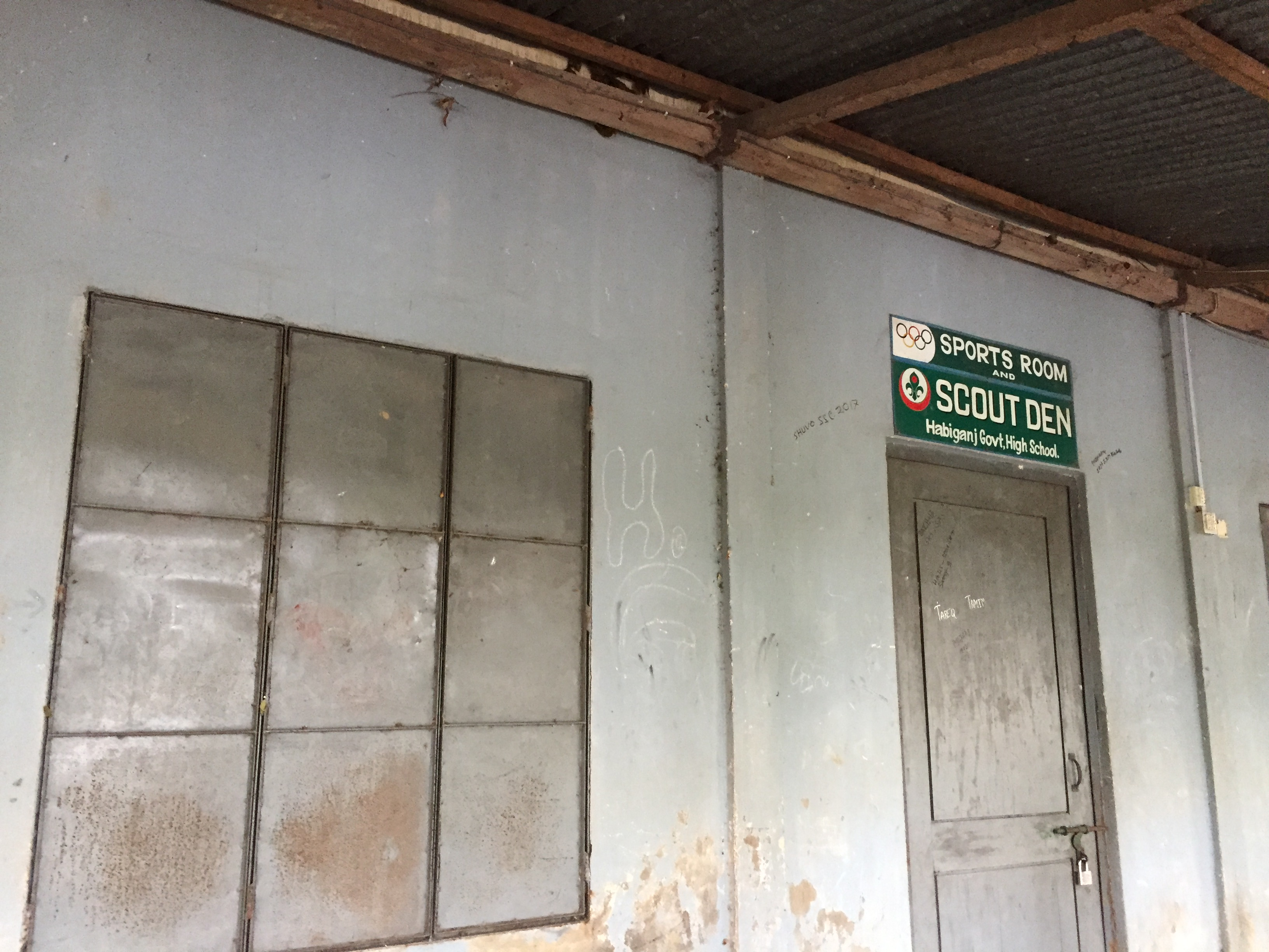 স্টুডেন্ট ডীন ভবনের একাংশ